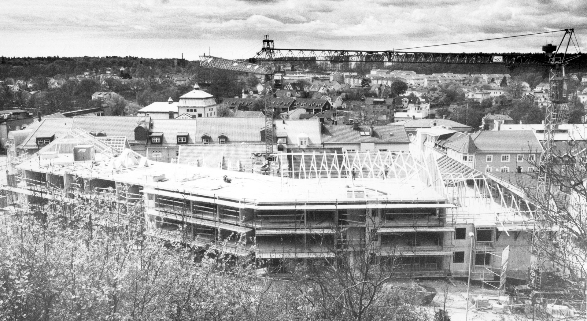 Fotografi av byggarbetsplatsen för nya bostäder i kvarteret Disa 1991 sett från Ronneby gamla vattentorn.